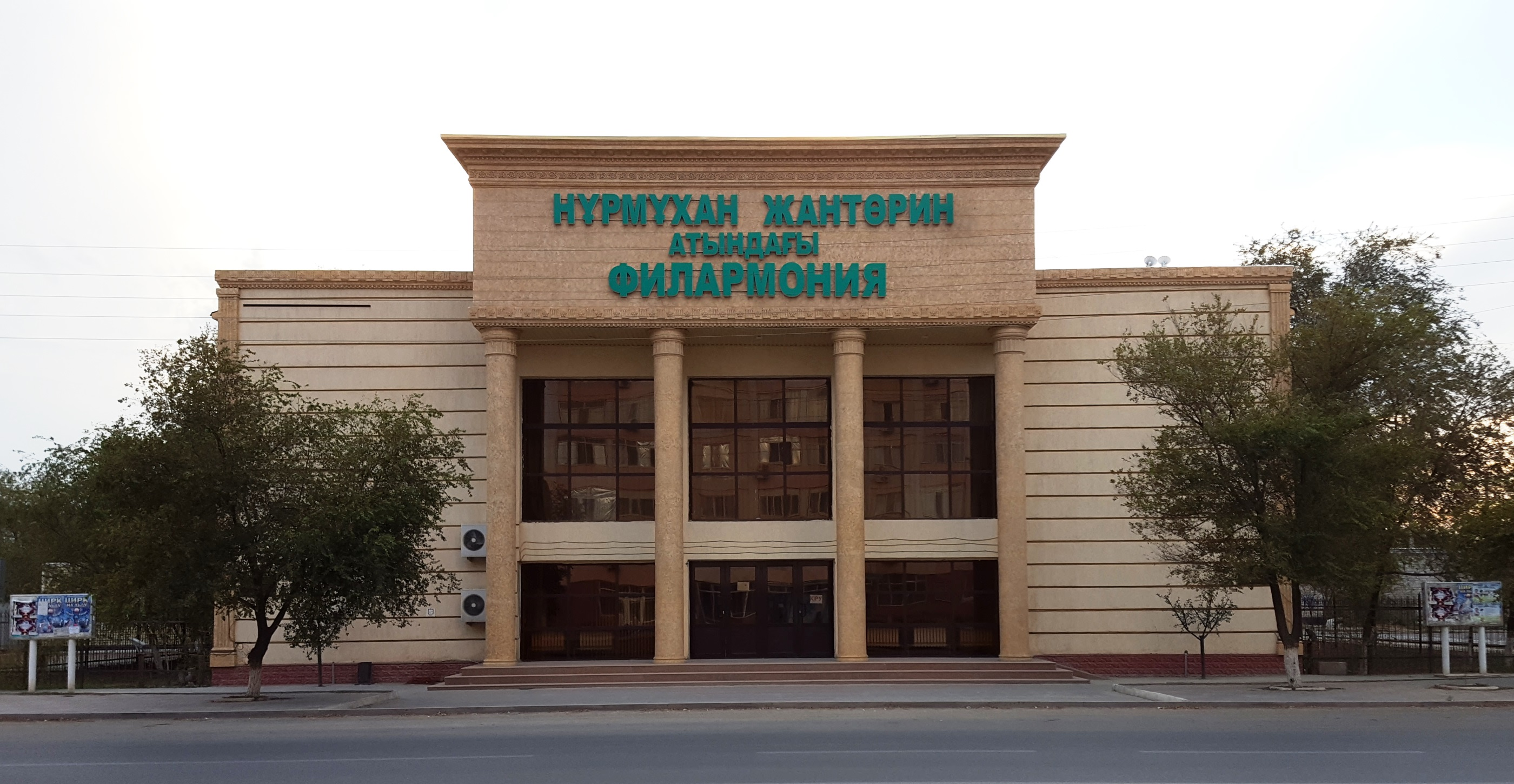 Қазақша (кирил): Нұрмұхан Жантөрин атындағы филармония